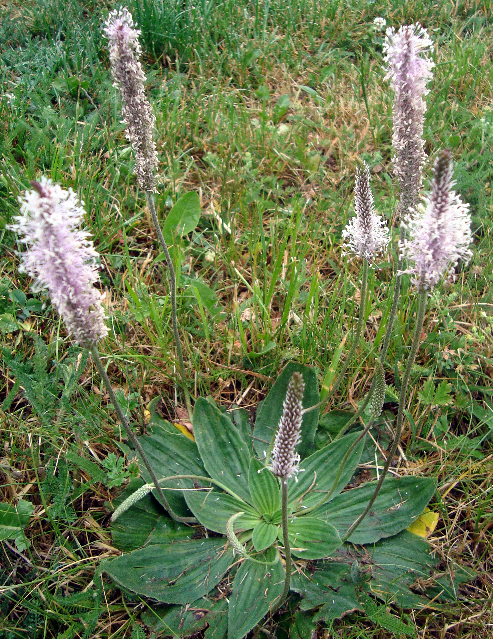 Jitrocel prostřední